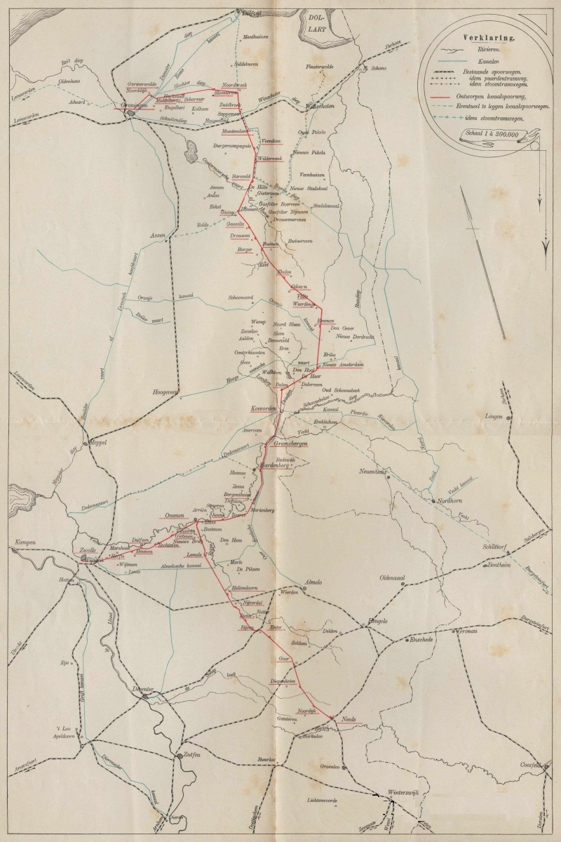 Ontwerp aanvraag voor concessie Noordoosterlocaalspoorweg-Maatschappij 1890